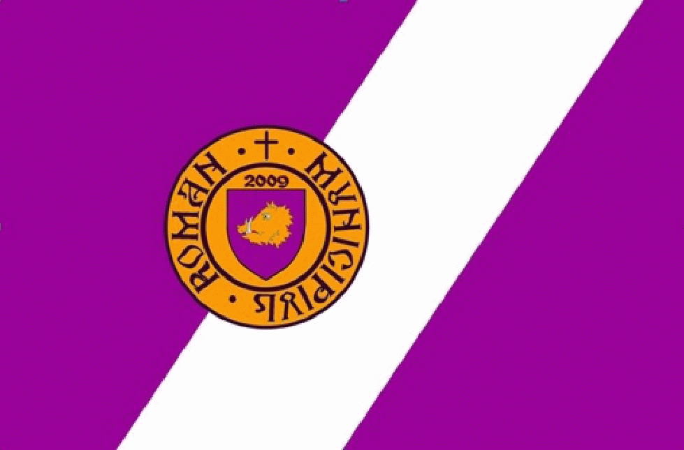 le drapeau de Roman